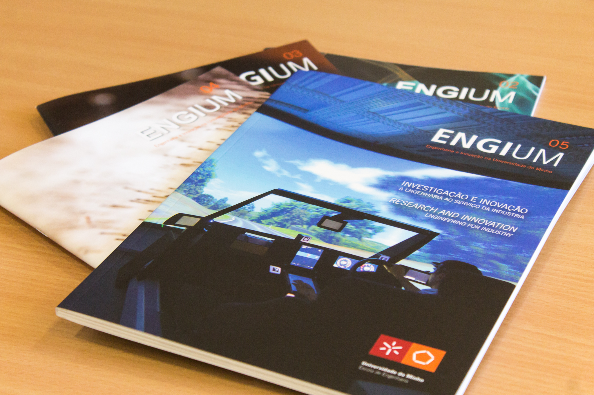 Revista ENGIUM n5